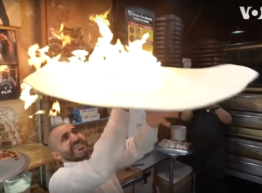 Хакки Акдениз демонстрирует своё мастерство приготовления пиццы